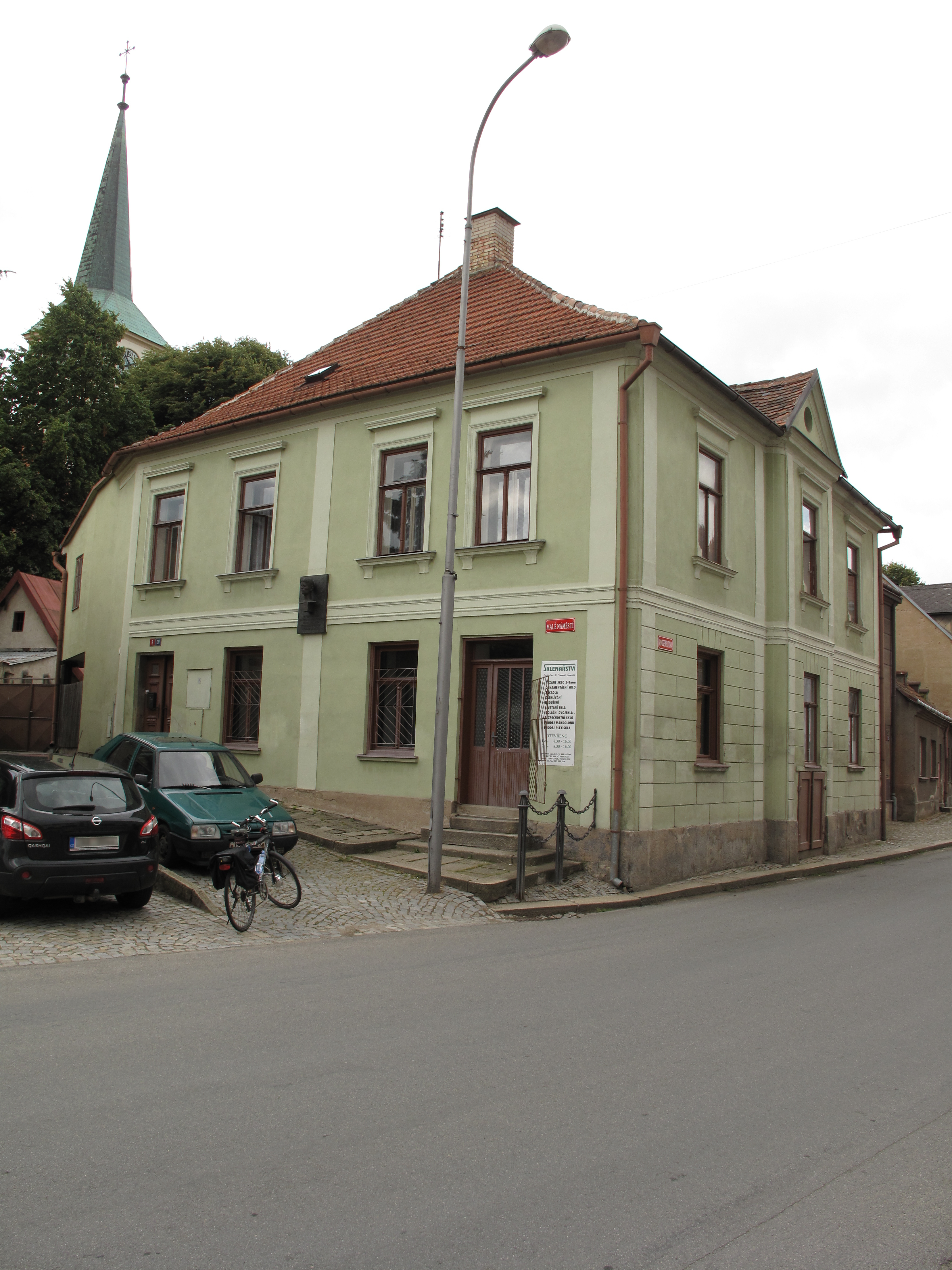 Dům Dr. Löwyho v Třešti, Malé nám. 131/9. Okres Jihlava, Česká republika.